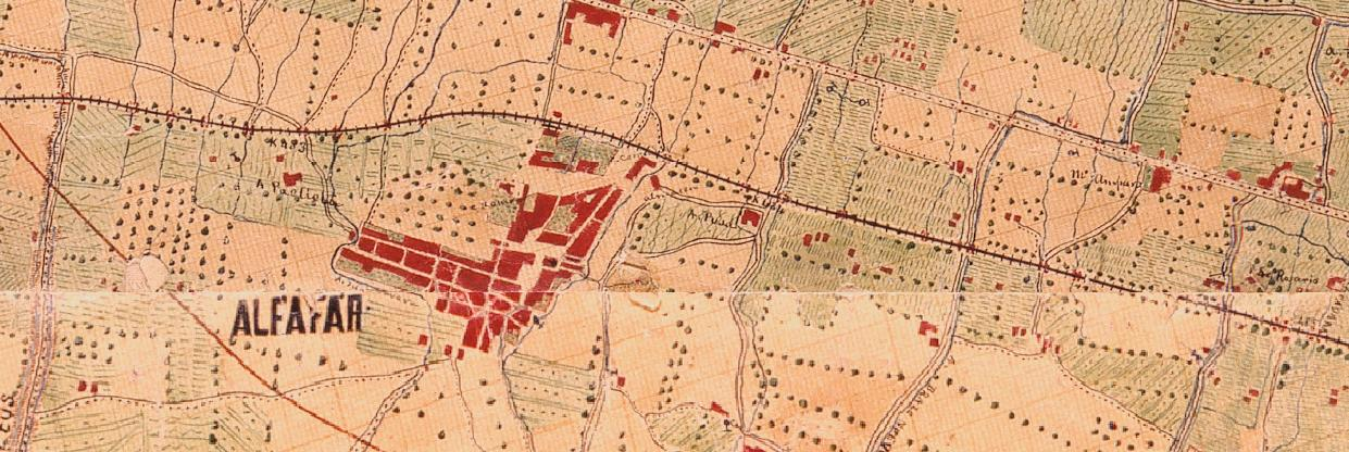 Alfafar el 1883 (el nord està a la dreta).